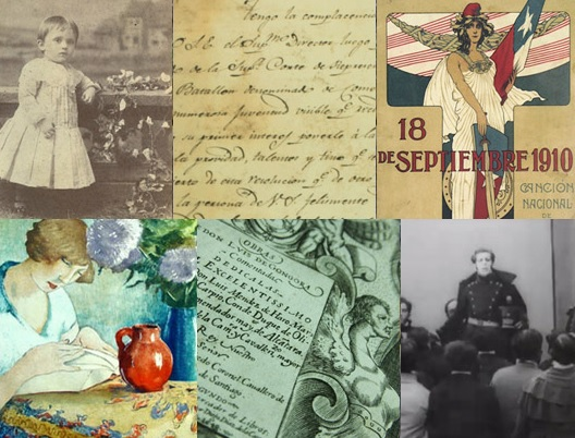 Algunas colecciones con las que cuenta la U. de Chile